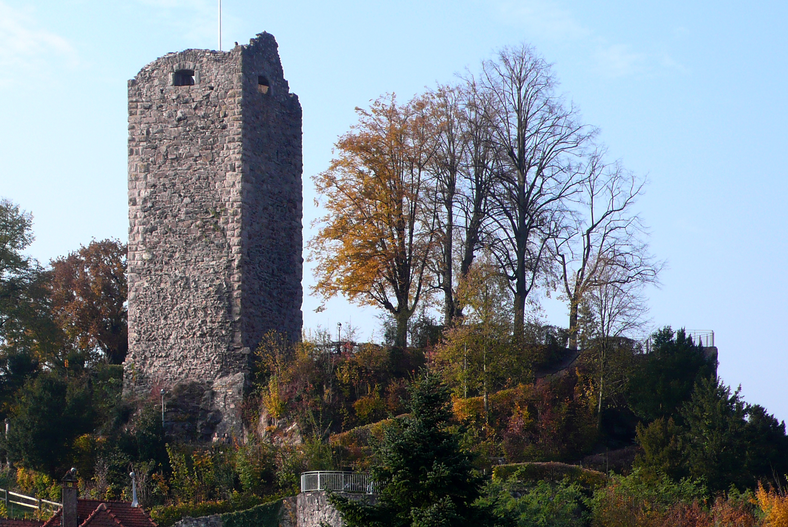 Ansicht von Süd